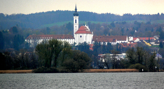 Dießen mit dem ehem. Augustiner-Chorherrenstift mit Marienmünster, vom gegenüberliegenden Seeufer gesehen